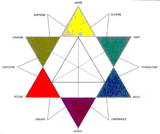 Palette : cristal 3 couleurs primaires